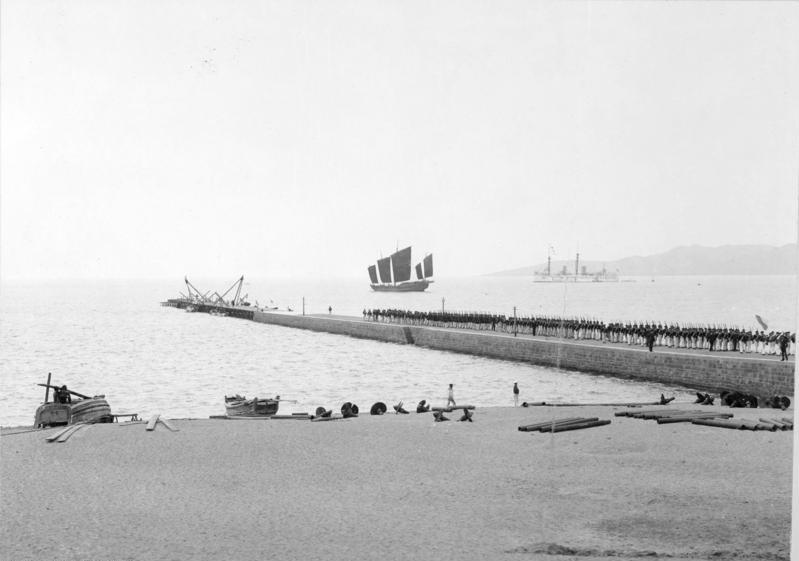 China 1898.- Landungsmanöver S.M.S. Deutschland bei der Landungsbrücke am Brückenlager.